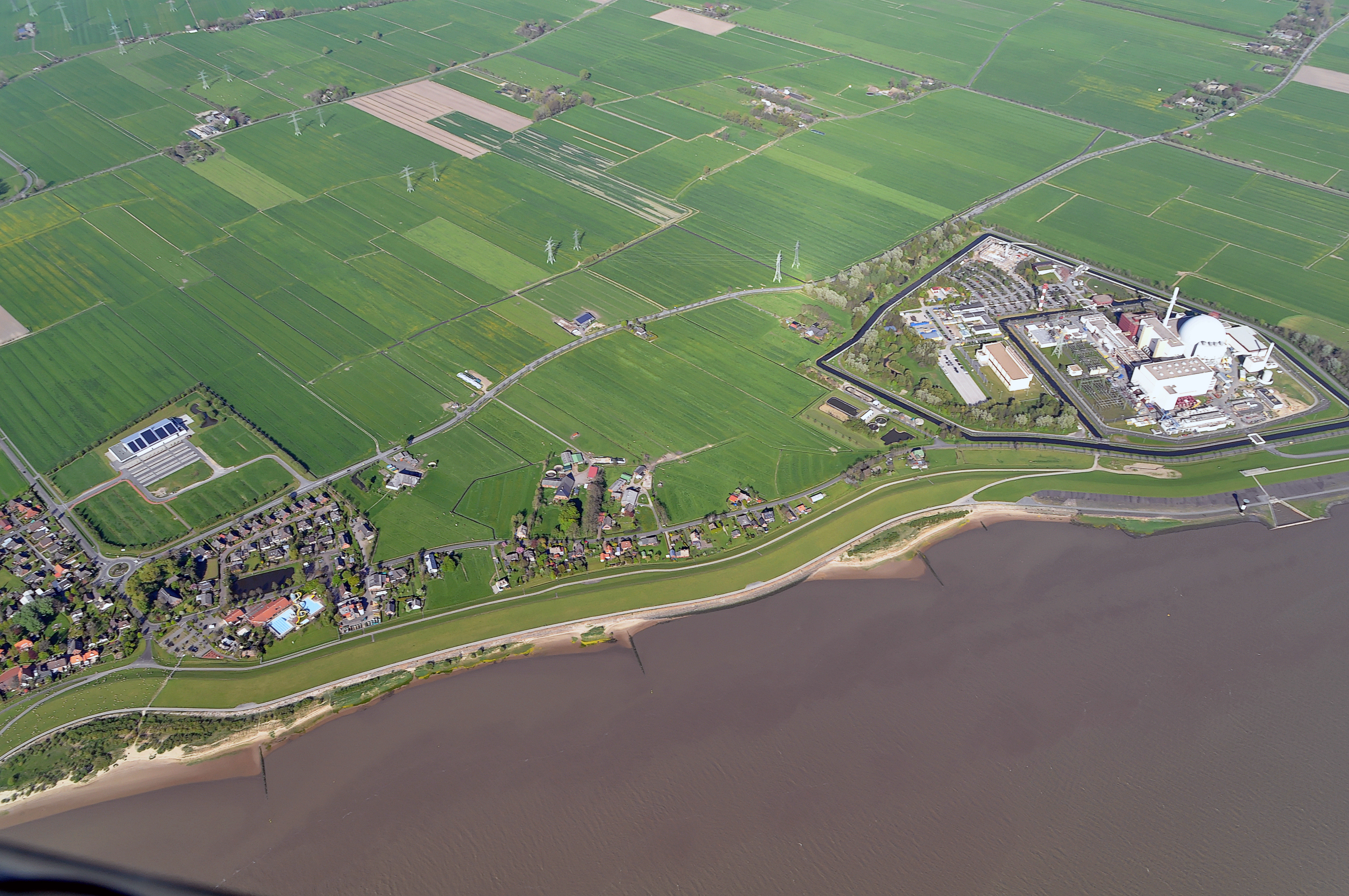 Luftbilder von der Nordseeküste 2012-05